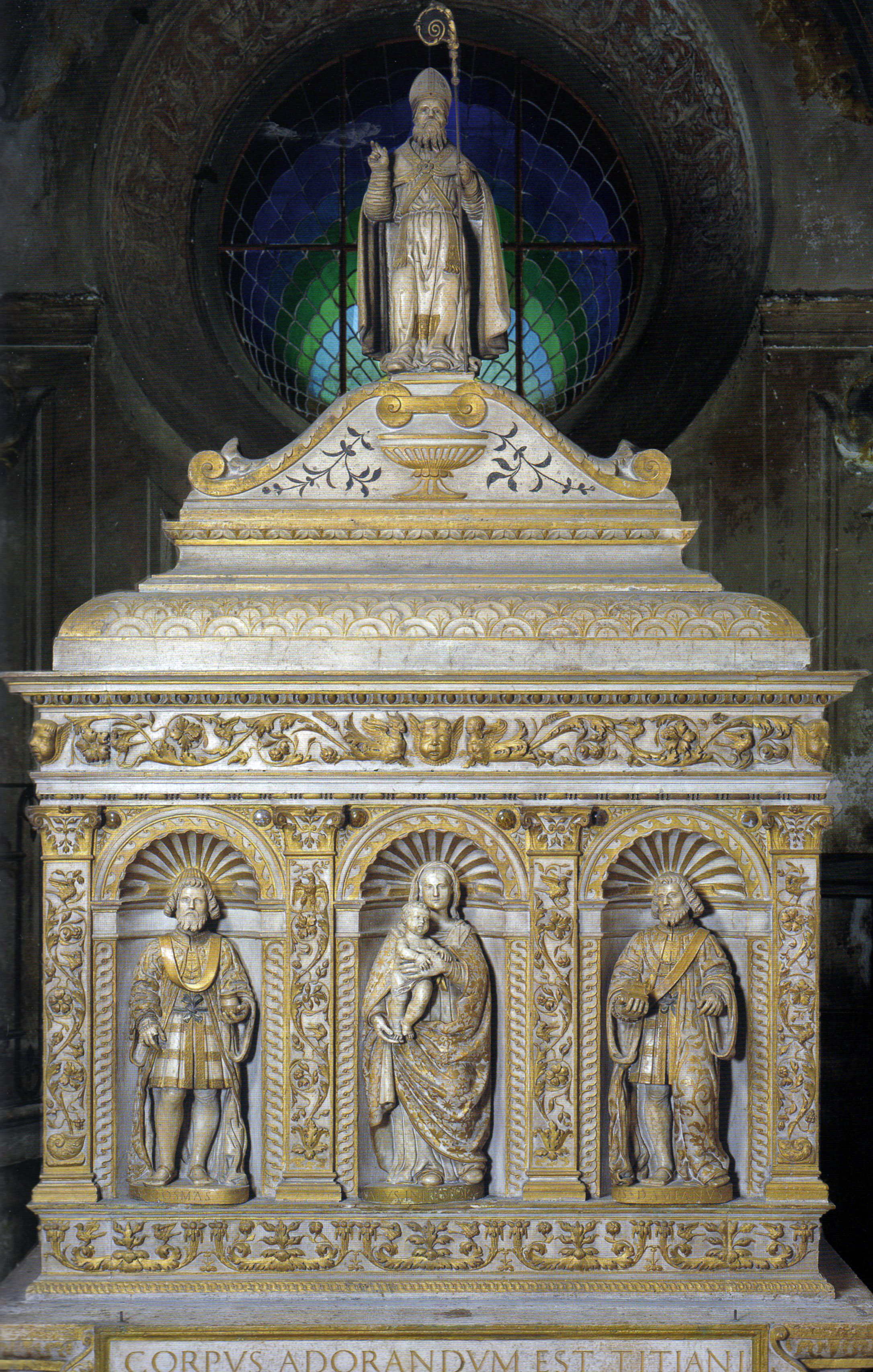 Arca di san tiziano (bottega dei Sanmicheli, chiesa dei Santi Cosma e Damiano, Brescia, 1505)